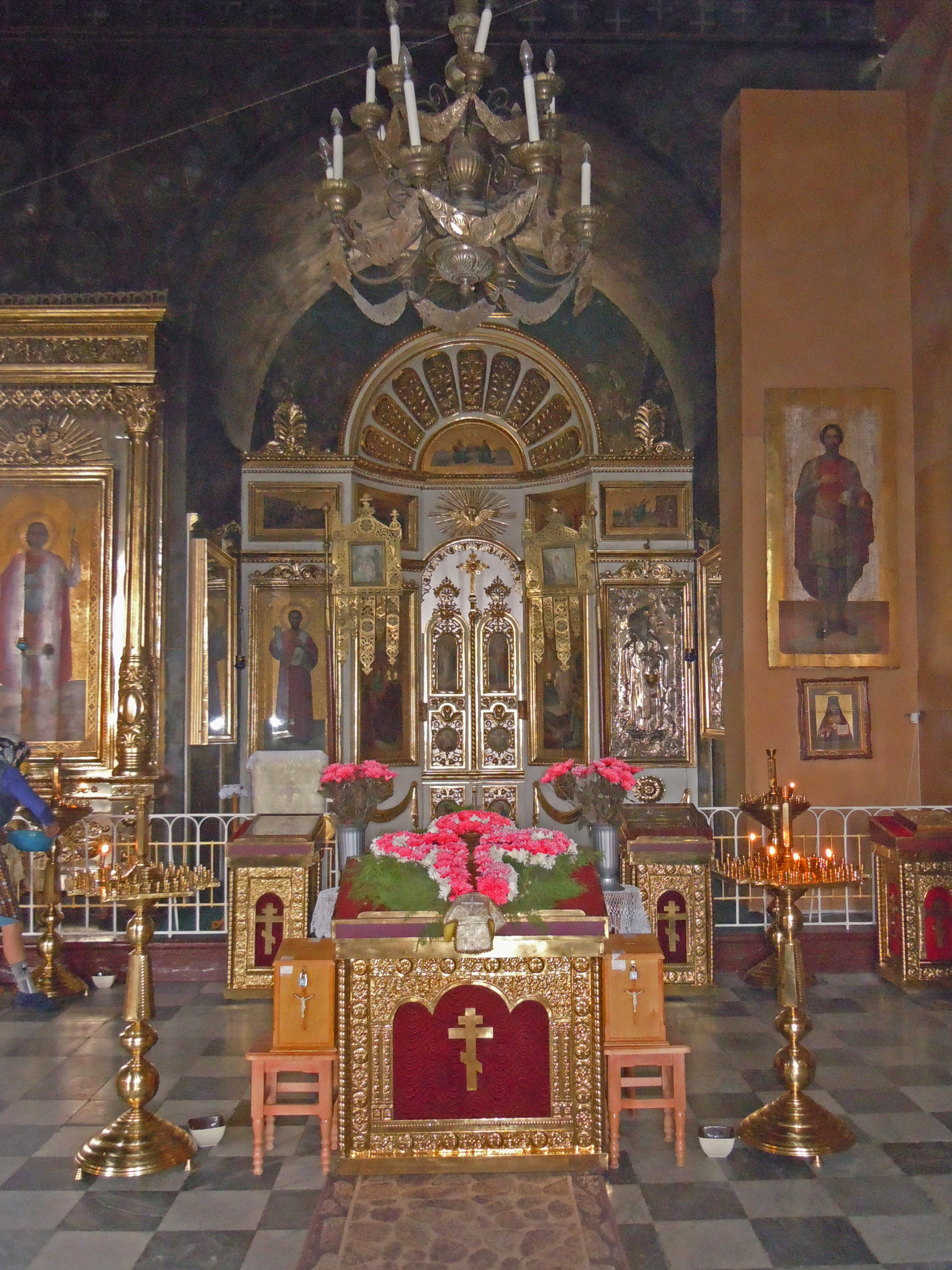 Преображенський собор, Болград, пр-т Леніна, ріг вул. Поштової і Училищної